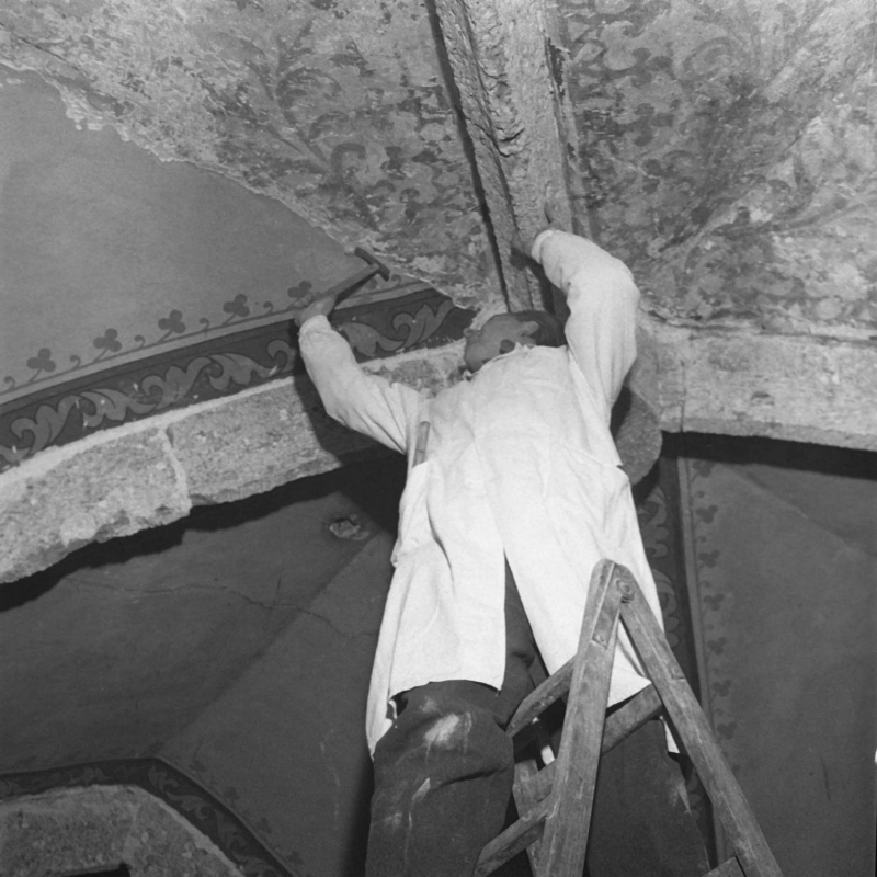 Der Künstler Bruno Malanik bei der Freilegung gotischer Fresken in der Bürgerspitalskirche St. Blasius in Salzburg.